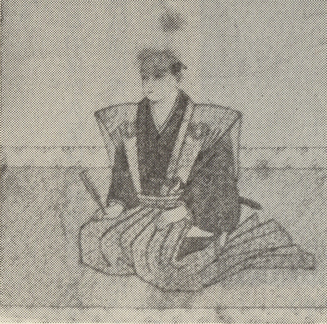 中川久恒の肖像(モノクロ)。